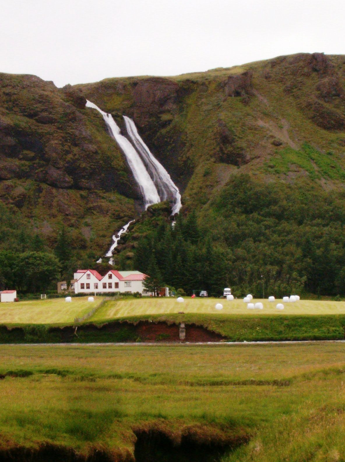 Systrafoss ([Kloster]-Schwesternfall) oberhalb von Kirkjubæjarklaustur.